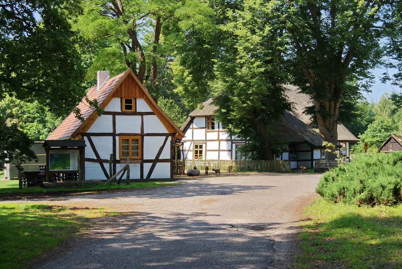 Meiers Hausstelle - Ehemaliges Forst und Grenzhaus in der Rostocker Heide